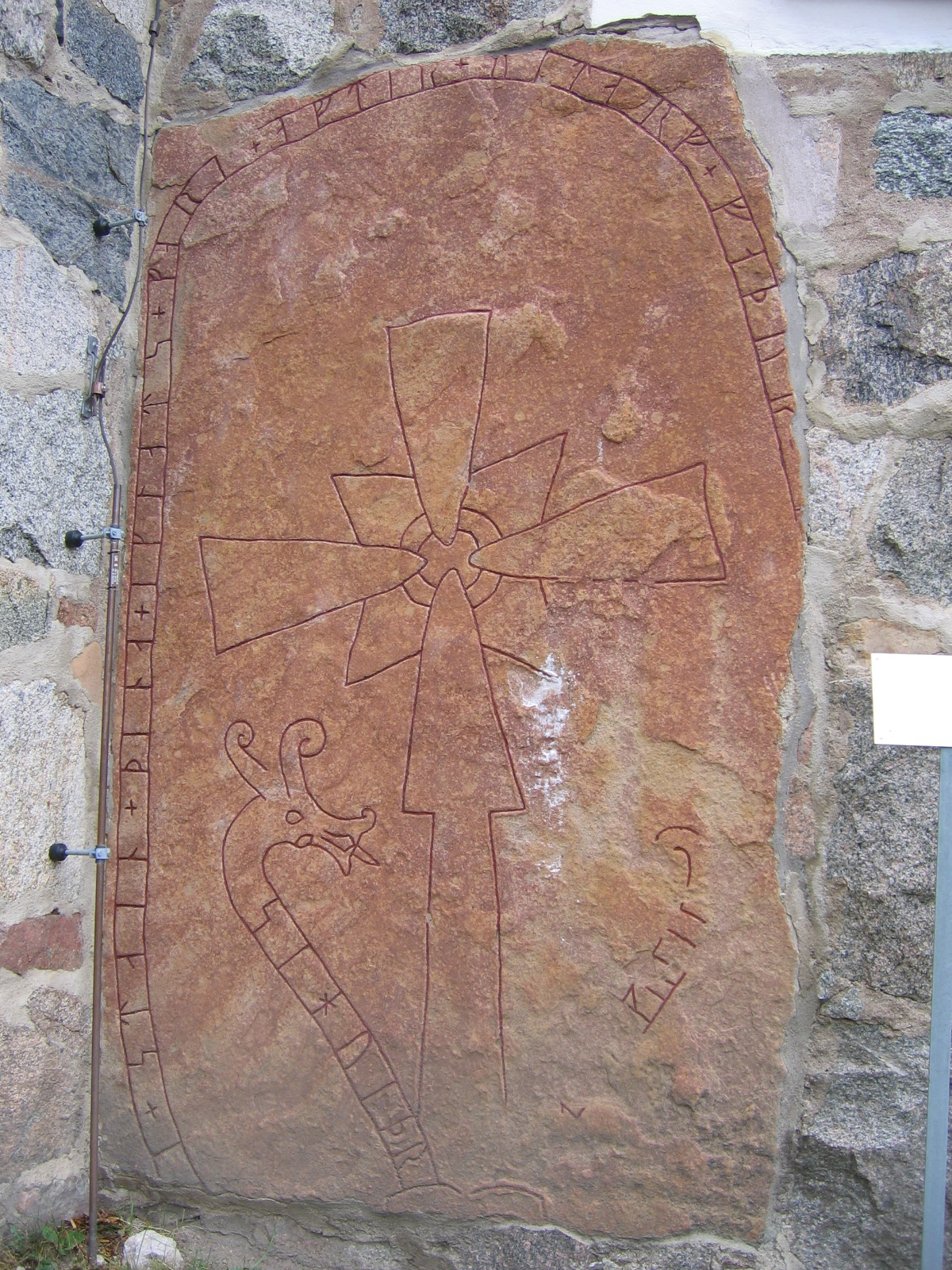 runestone